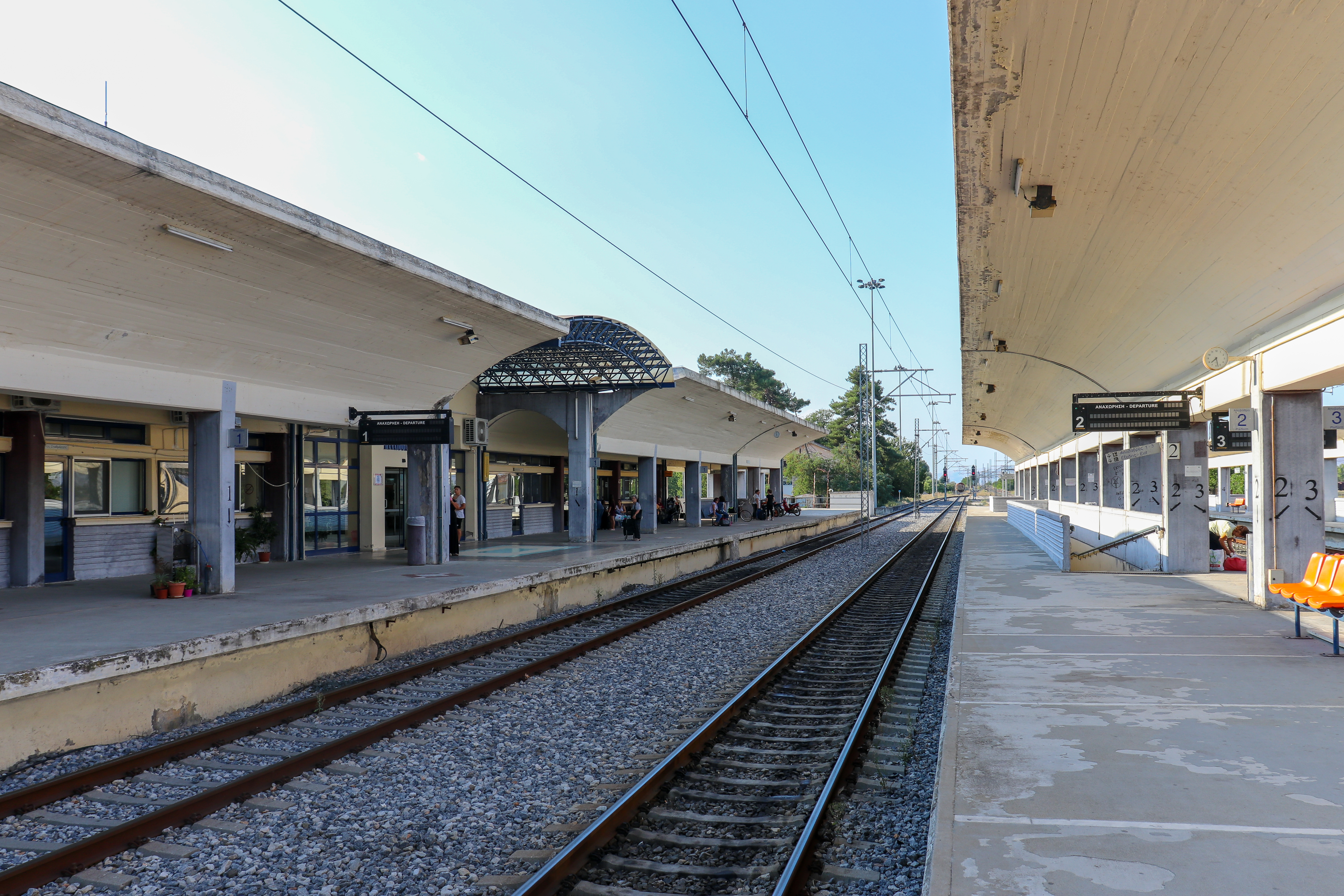 Железнодорожная станция "Палеофарсалос"